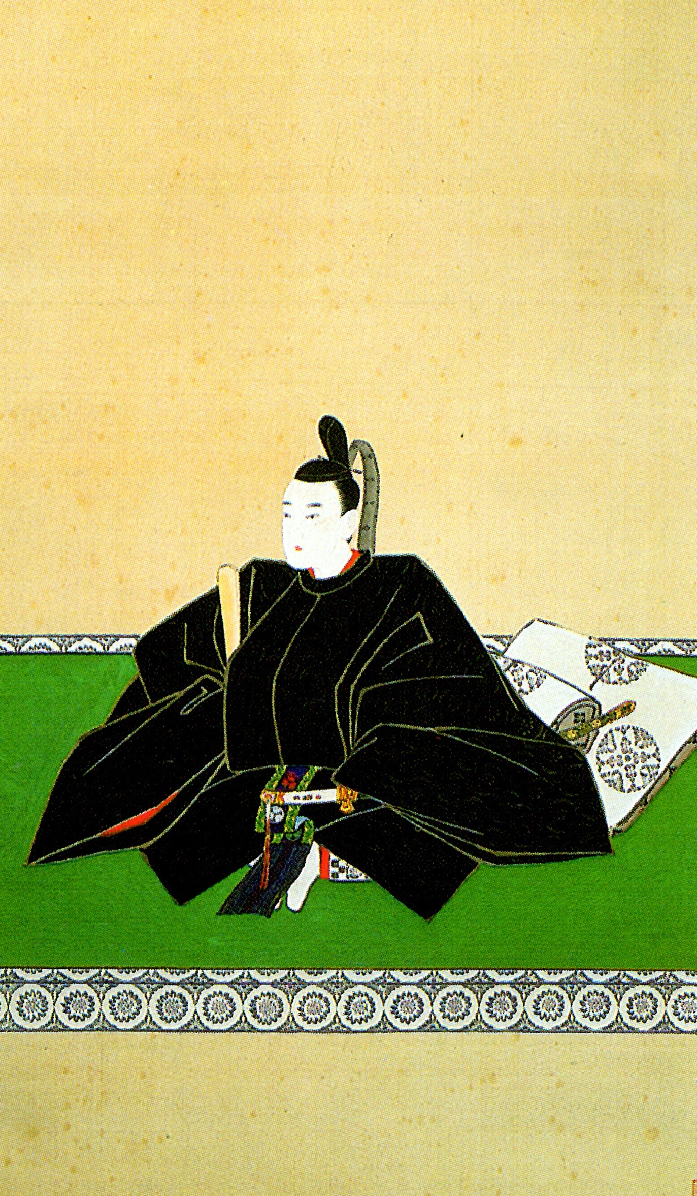 松平容衆の肖像。